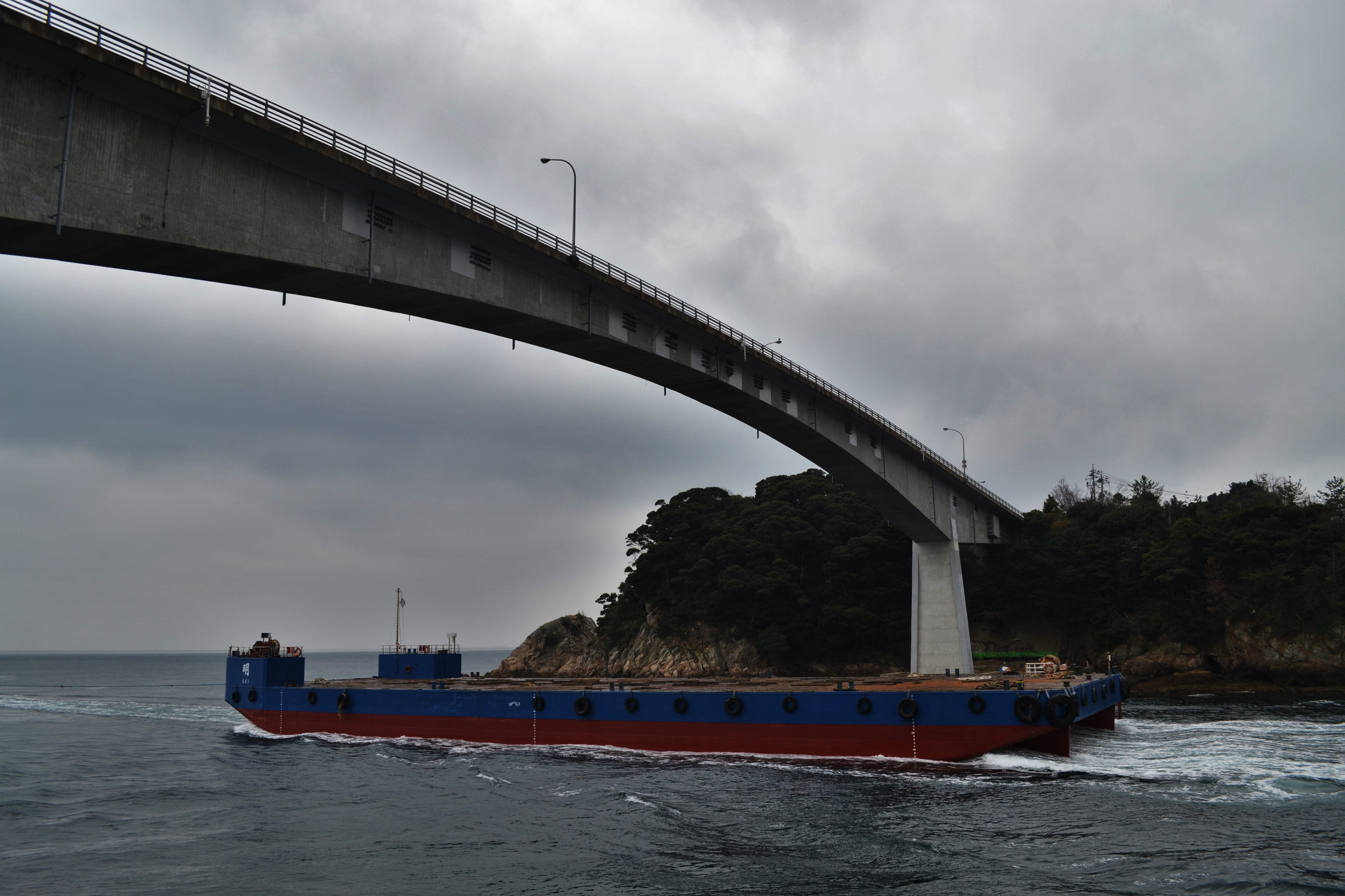 上関大橋と上関海峡